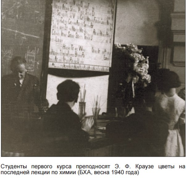 Большая химическая аудитория им. Н.Д. Зелинского